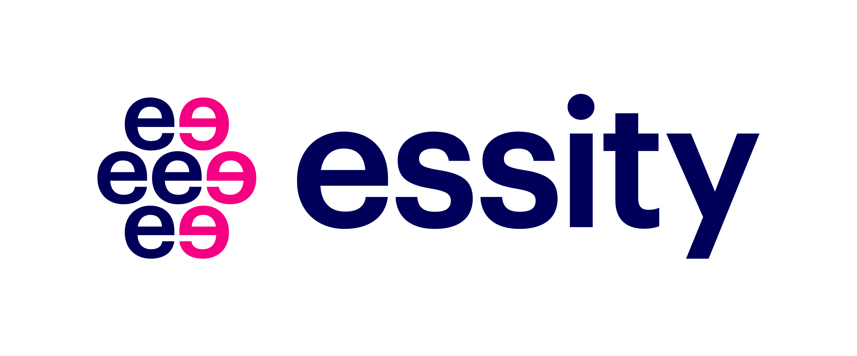 Essitys logo